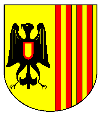 Escut municipal de l'ajuntament, ja desaparegut, d'Hortoneda de la Conca (Conca de Dalt, Pallars Jussà)